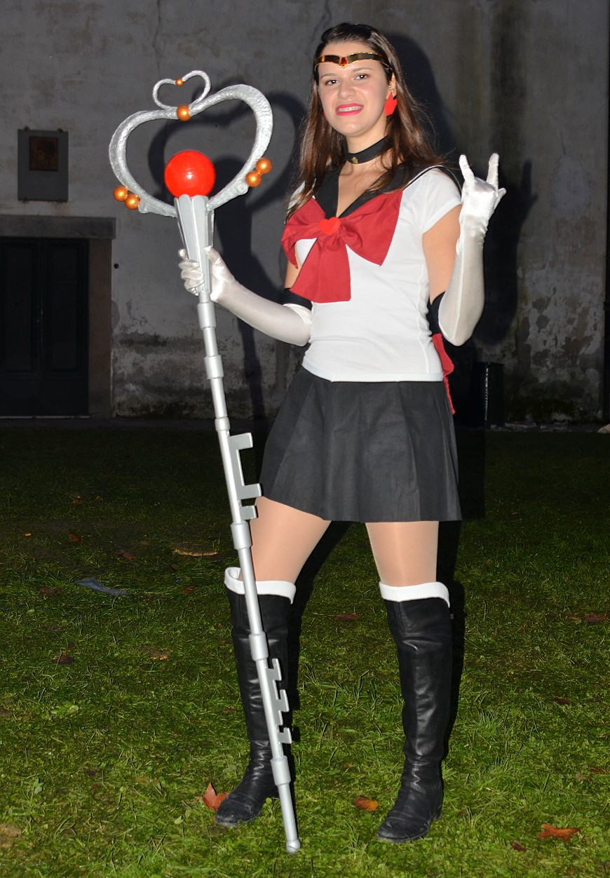 Lucca Comics 2012